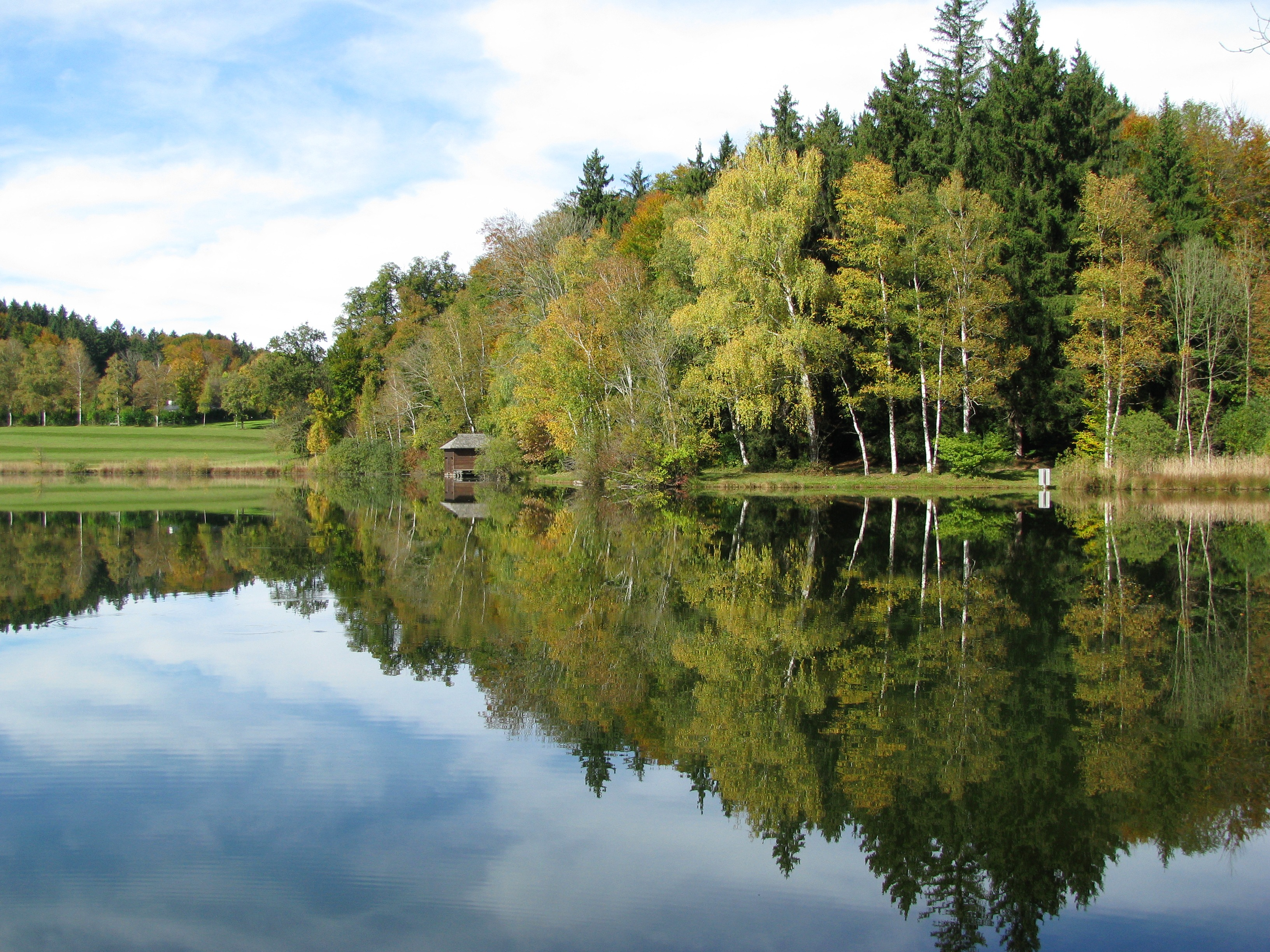 Haarsee im Herbst; Blick vom Ost zum Nordufer.